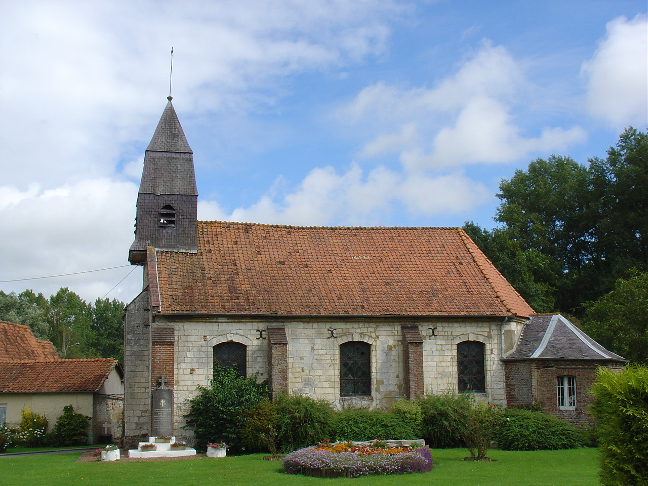 Église d'Aubrometz